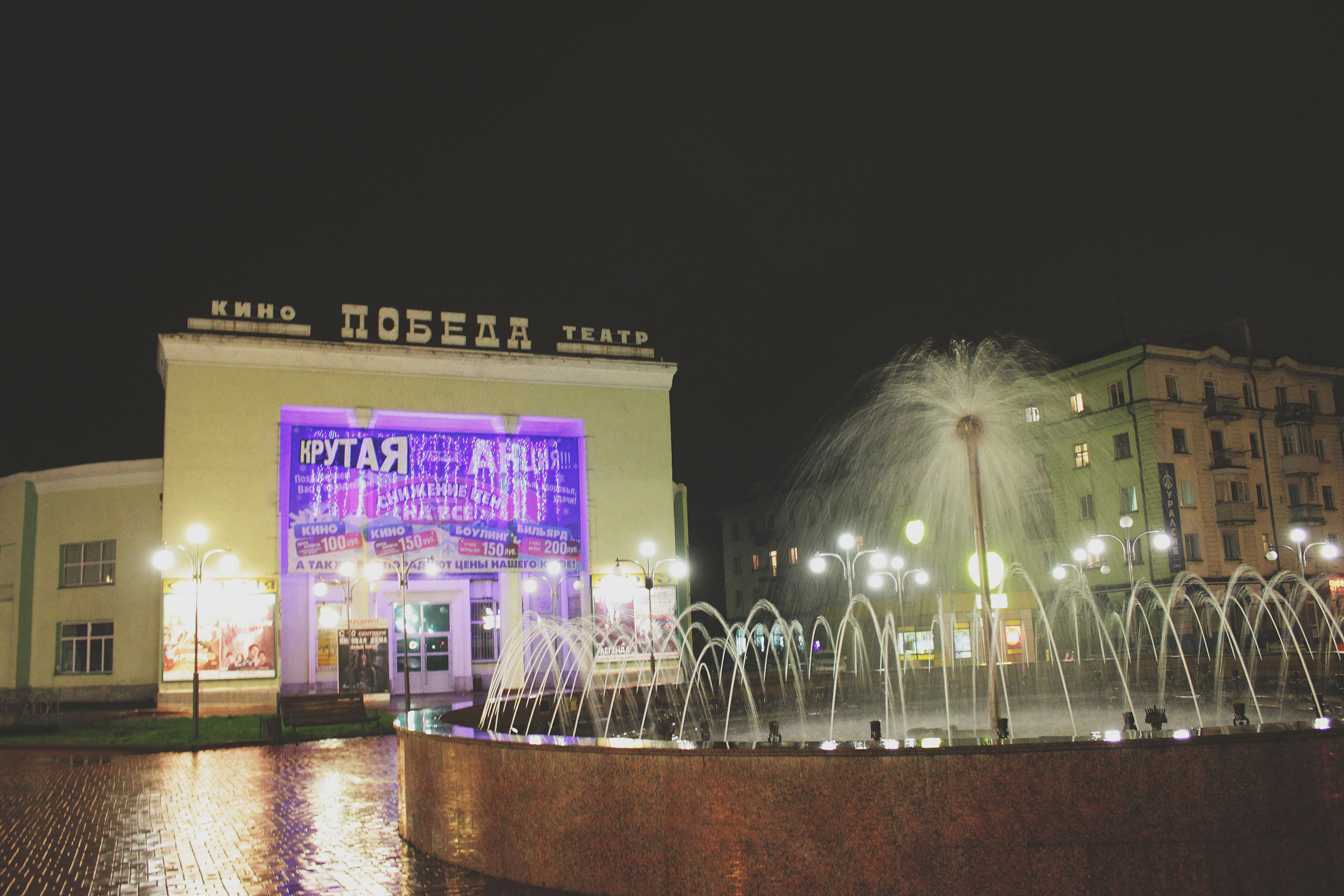 Кинотеатр Победа: проспект Кирова, 34, Ленинск-Кузнецкий, Кемеровская область